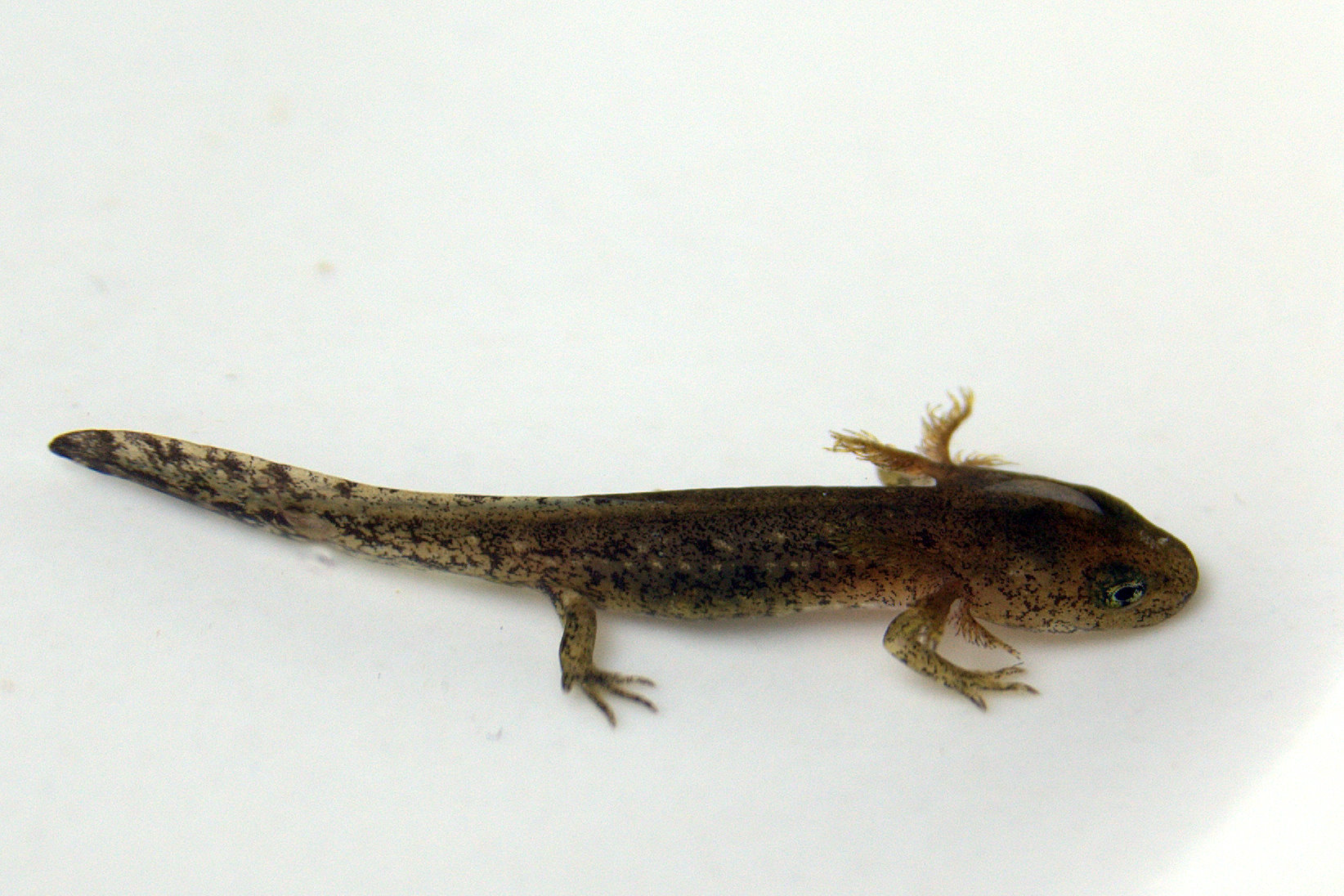 Newt larva.